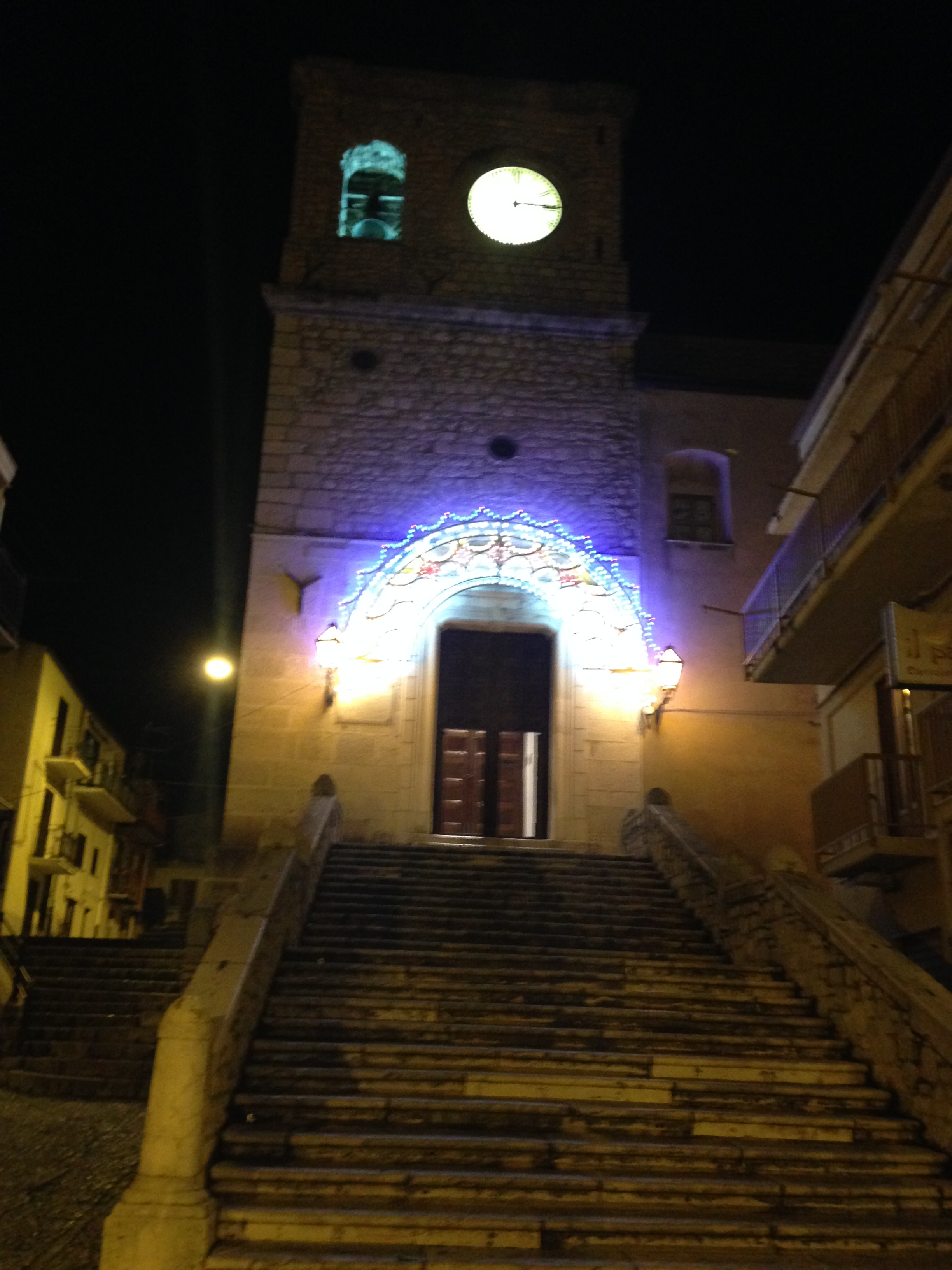 Ingresso Matrice San Giovanni Gemini